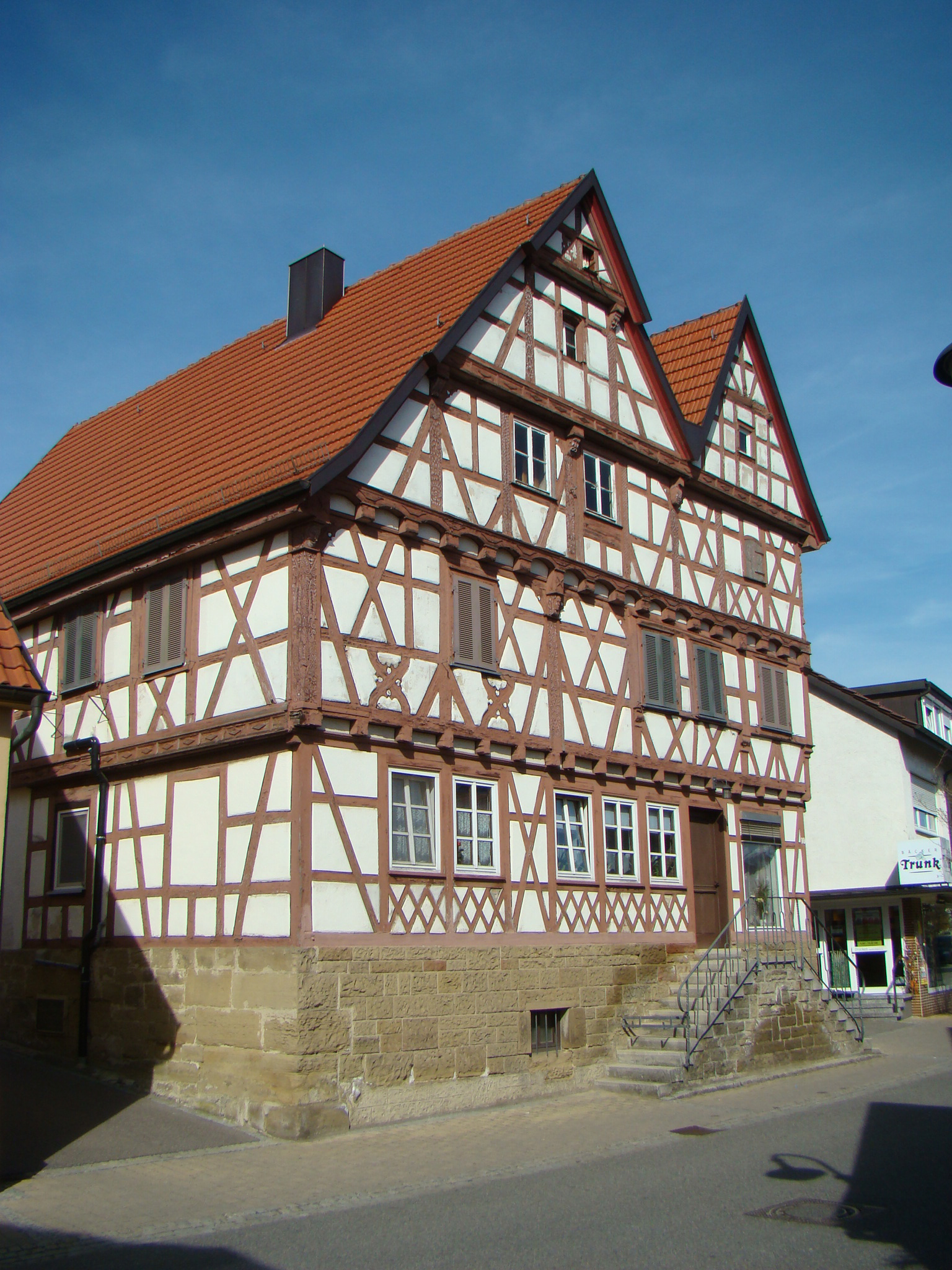 Oettingerhaus in Obersulm-Sülzbach.